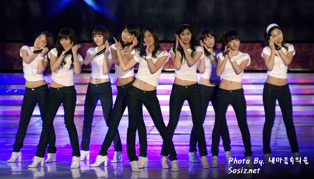 2009 백상예술대상에서 소녀시대의 축하무대이다.